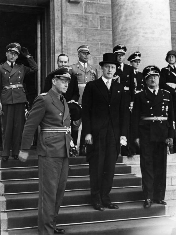 ADN-ZB-Archiv Aus dem faschistischen Deutschland (1933-1945) Nach der Unterzeichnung der Nichtangriffsverträge empfing Hitler in der Neuen Reichskanzlei in Berlin am 7.6.1939 den estnischen und den lettischen Außenminister. U.B.z: den estnischen Außenminister Selter und Nazi-Außenminister von Ribbentrop beim Verlassen der Reichskanzlei nach dem Empfang bei Hitler; [r.: Dr. Otto Meißner]. [Scherl Bilderdienst]